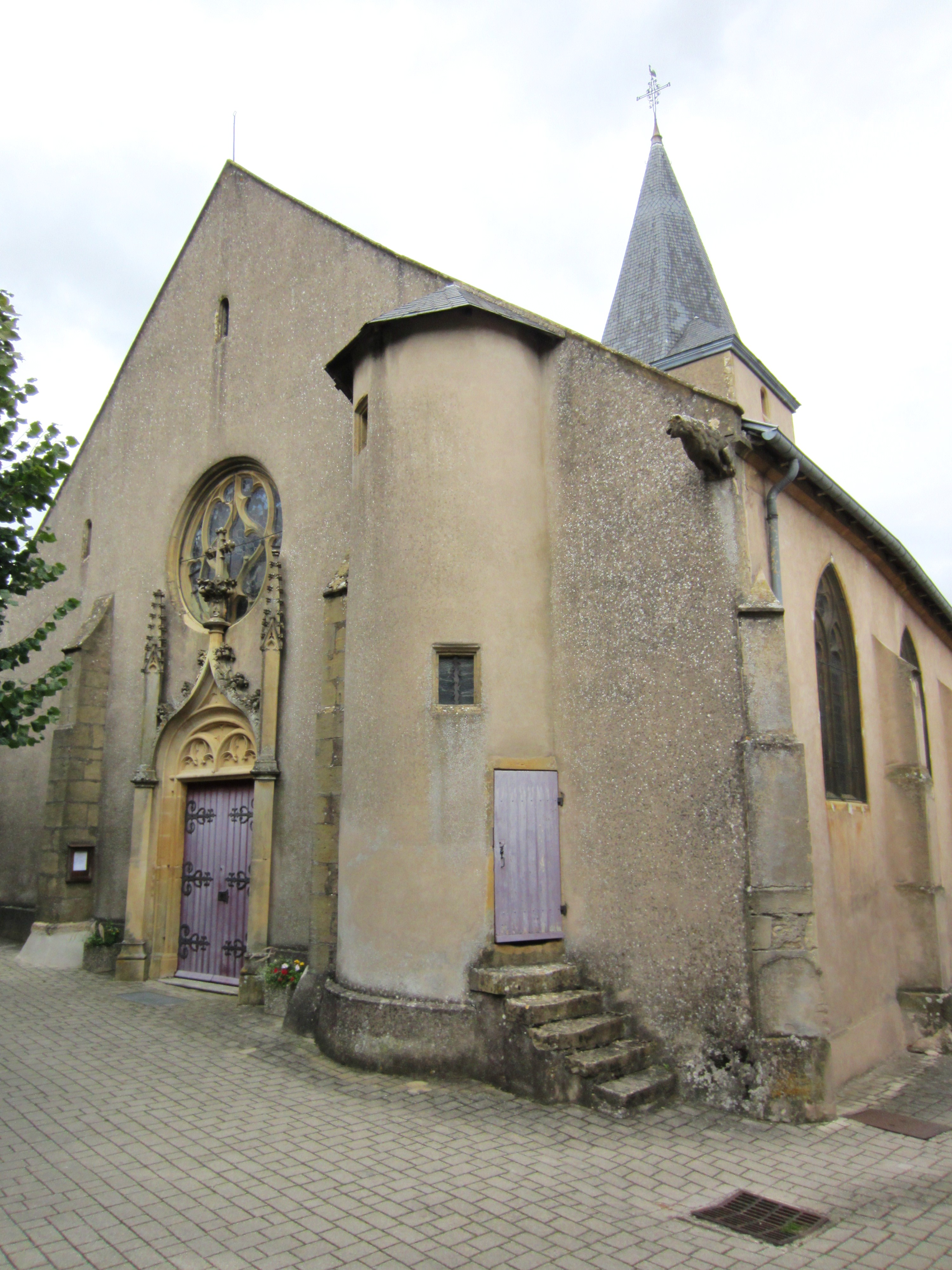 Description eglise saint Remi Rozerieulles Date7 September 2011Sourcemon appareil photoAuthorAimelaimePermission (Reusing this file) eglise saint Remi Rozerieulles